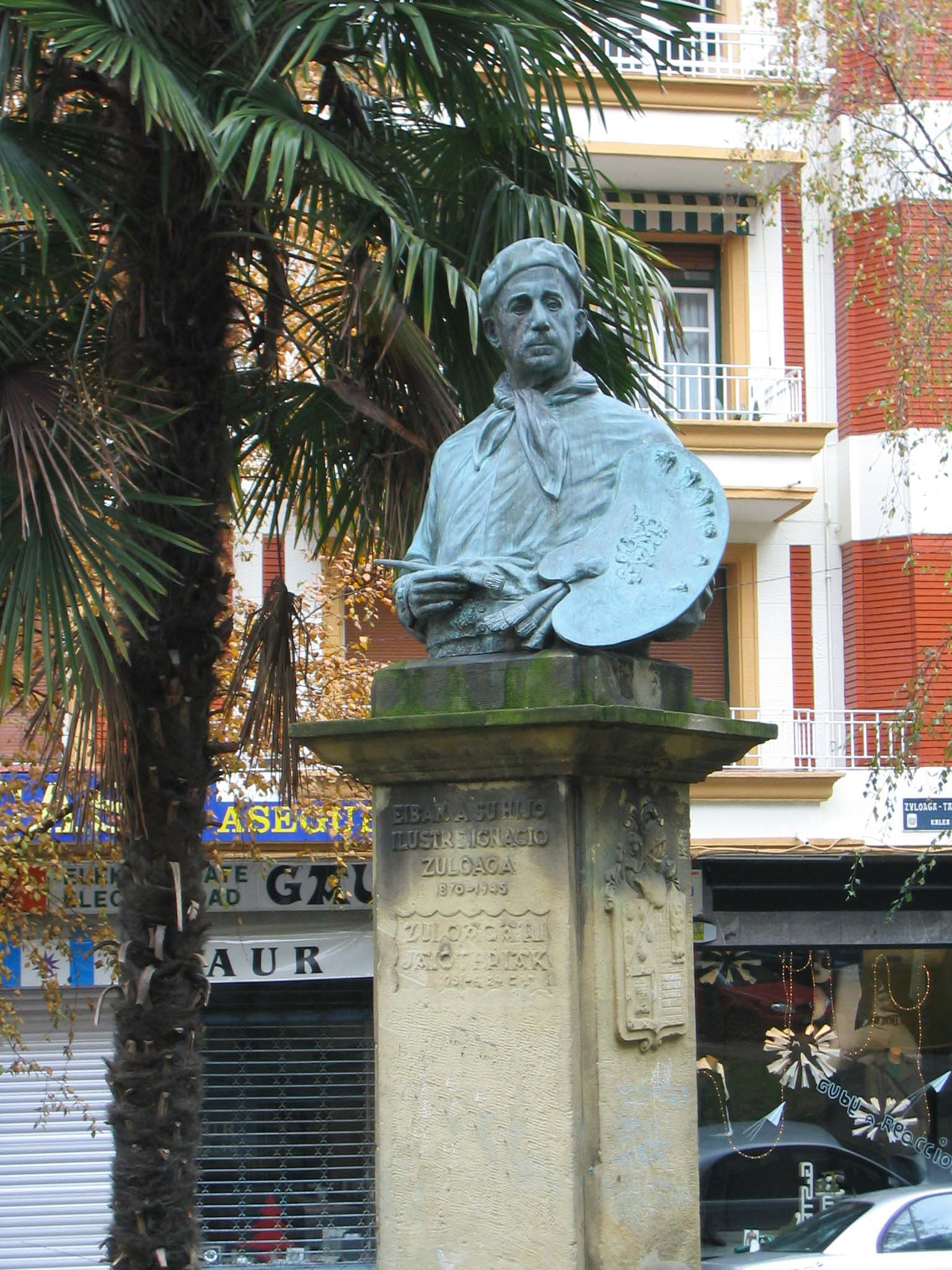 Ignacio Zuluaga monumento en Eibar, Guipúzcoa (País vasco) (España).